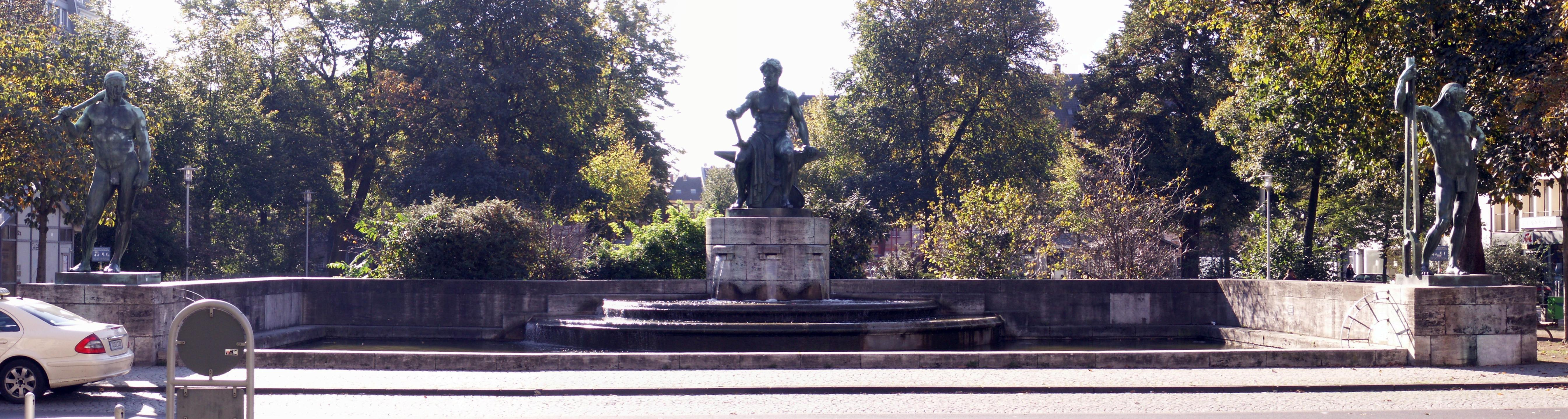 Der Industriebrunnen am Fürstenplatz in Düsseldorf mit den drei Bronzefiguren „Schmied Vulkan“, „Bergmann“ und „Hüttenarbeiter“ von Friedrich Coubillier